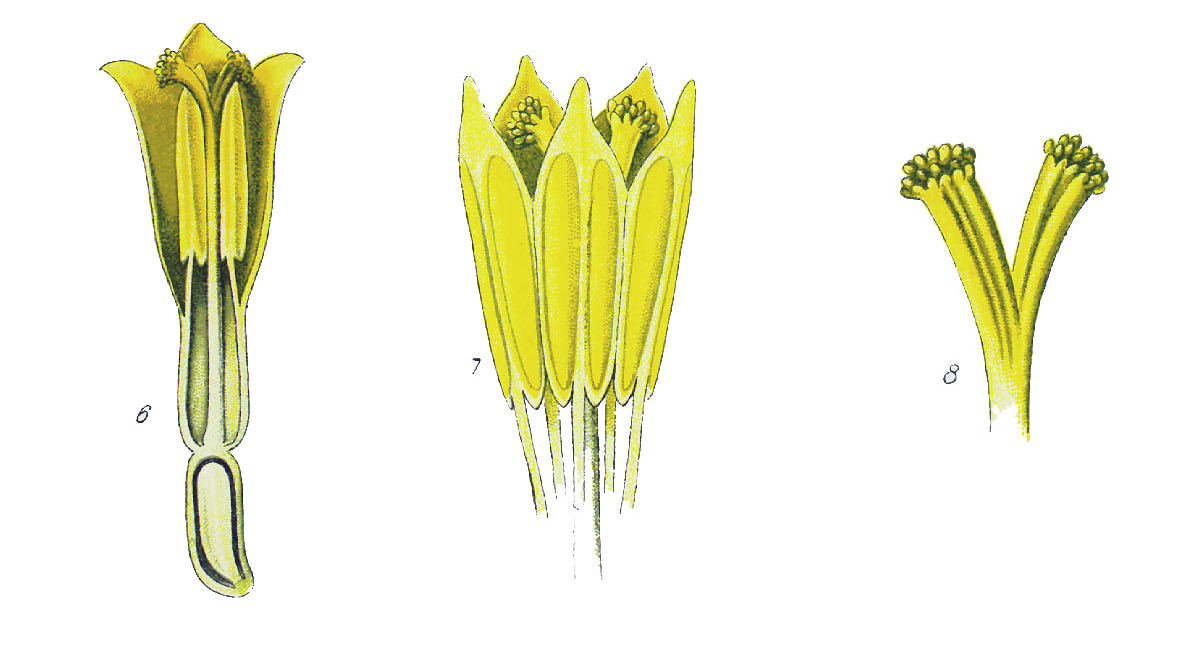 Matricaria recutita - Sezione longitudinale e dettagli di flosculo tubulare